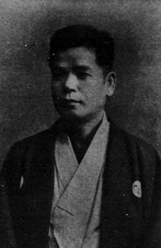 江木衷（1858-1925）